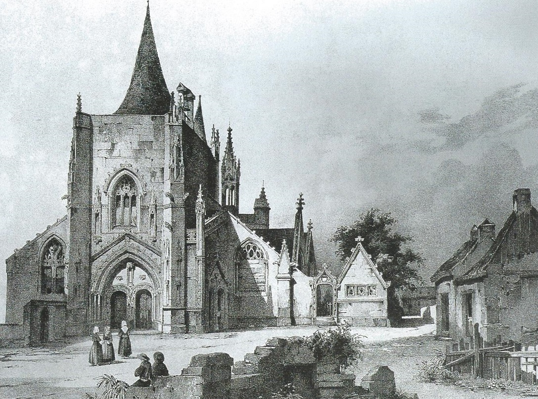 L'église Saint-Nonna de Penmarc'h (Isidore Taylor et Charles Nodier, Voyages pittoresques et romantiques dans l'ancienne France)